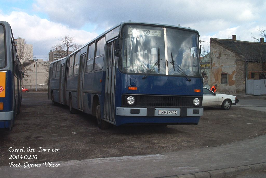 A BKV egyik első Ikarus 280.49-ese a Szent Imre téren 159-es jelzéssel (frsz. BPI-704, korábban BX-52-40)